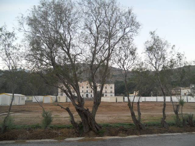 Ο προσφυγικός καταυλισμός στήνεται μπροστά από το εμβληματικό κτίριο του εγκαταλελειμμένου 11ου περιπτέρου του Ψυχιατρείου γνωστού ως "κολαστήριο της Λέρου"